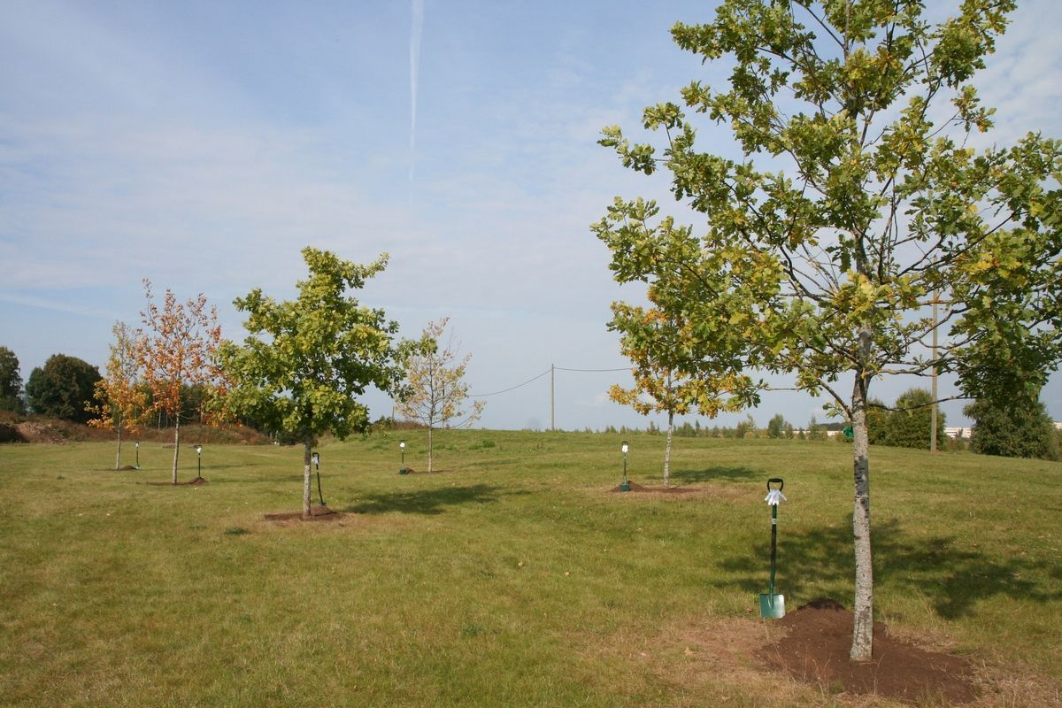 Tartu tammik.